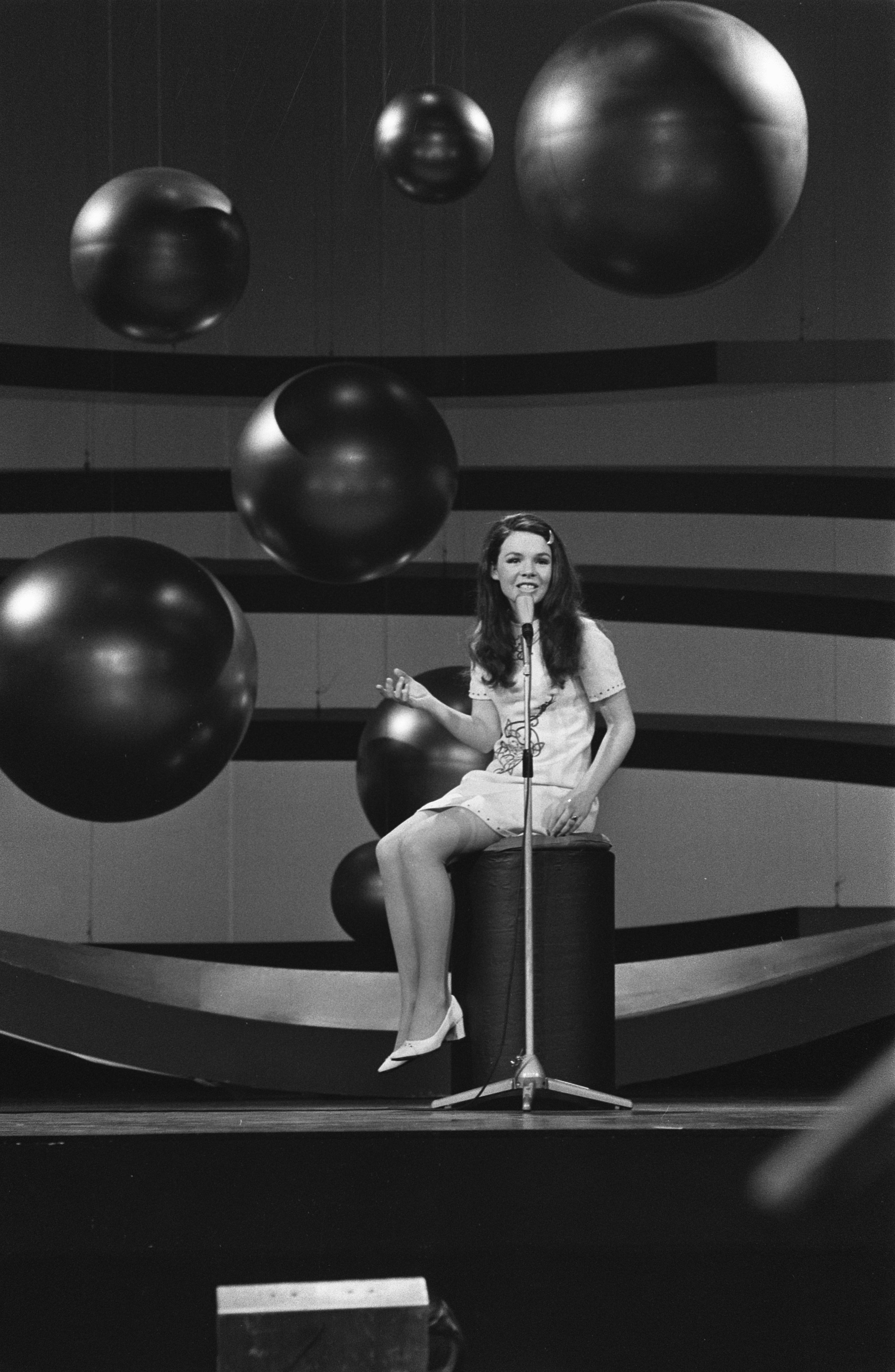 Collectie / Archief : Fotocollectie Anefo Reportage / Serie : Eurovisie Songfestival 1970 in RAI te Amsterdam Beschrijving : Dana (Ierland) Annotatie : De uiteindelijke winnares. Volledige naam: Dana Rosemary Scallon Datum : 21 maart 1970 Locatie : Amsterdam Trefwoorden : artiesten, songfestivals, zangers Persoonsnaam : Dana (zangeres) Instellingsnaam : Eurovisie Song Festival Fotograaf : Koch, Eric / Anefo Auteursrechthebbende : Nationaal Archief Materiaalsoort : Negatief (zwart/wit) Nummer archiefinventaris : bekijk toegang 2.24.01.05 Bestanddeelnummer : 923-3695 Reacties Geplaatst door Musiclady op 28 juli 2016 - 10:01. (Ierland) Dana zingt het - winnende - liedje 'All Kinds of Everything'. NB. geboren als Rosemary Brown, vooral bekend onder haar artiestennaam Dana.